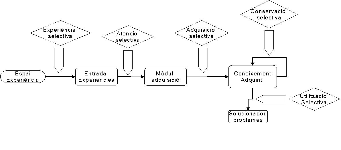 Esquema de la localització dels punts de posició possibles per filtres d'informació